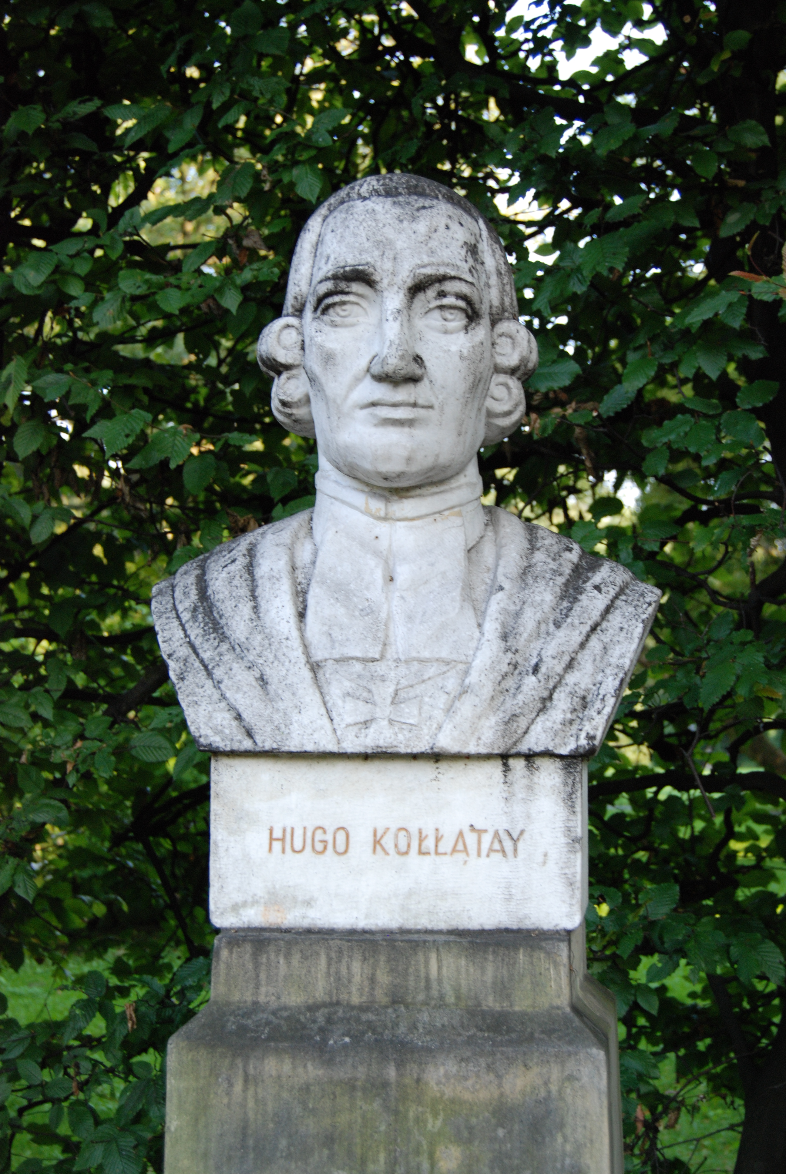 Pomnik Hugona Kołłątaja Zofii Baltarowicz-Dzielińskiej w Parku Jordana w Krakowie